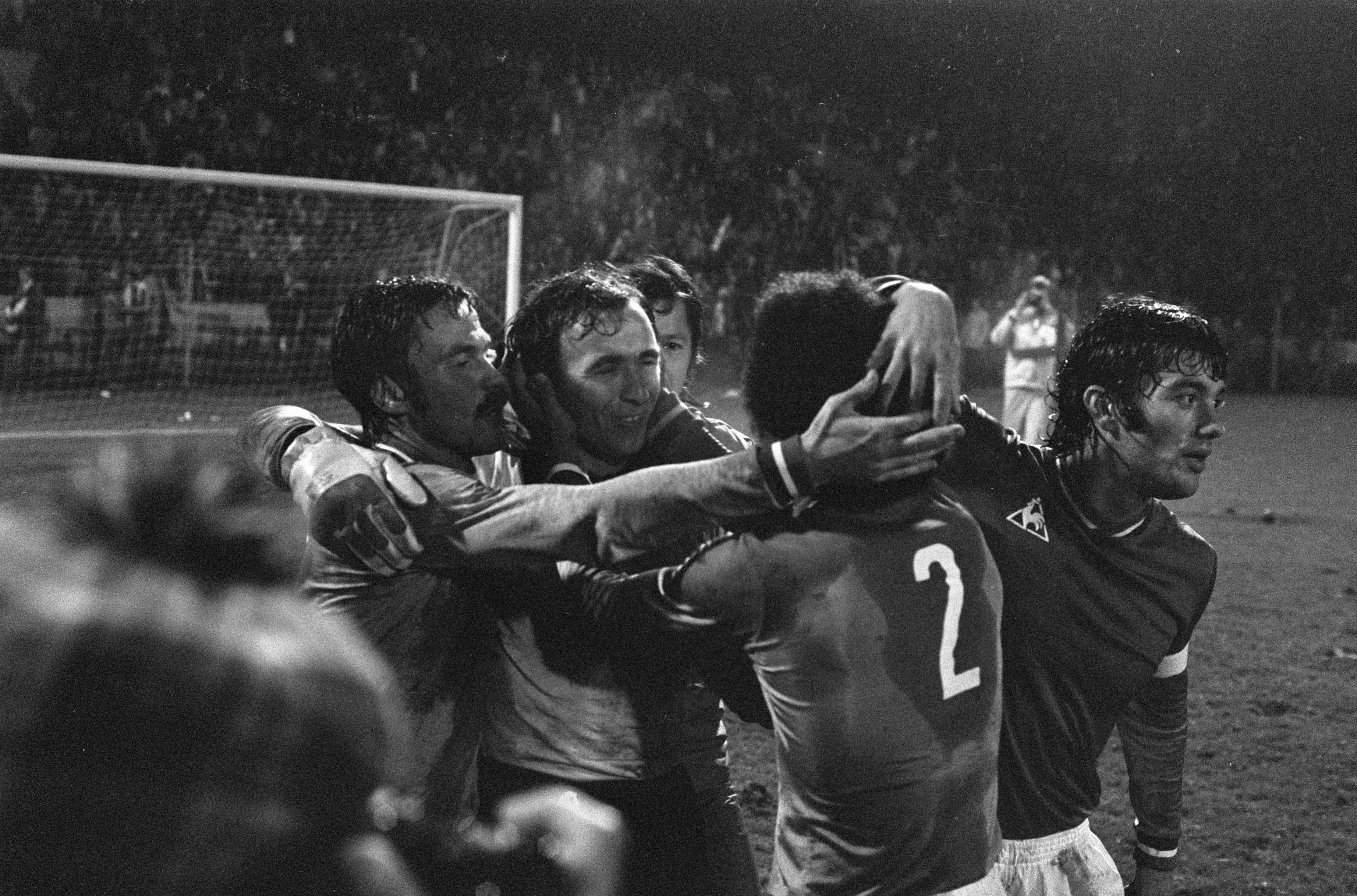 joueurs de l'AS Saint-Etienne en train de se féliciter en 1976